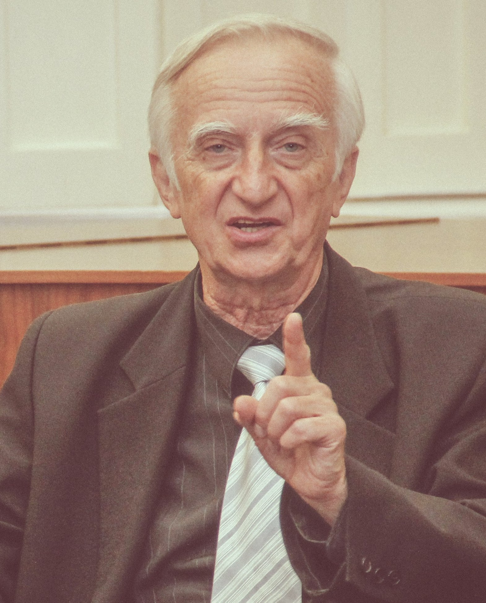 Árpád Balázs composer at the presentation of his book "My Selected Life" in Szentes. Balázs Árpád zeneszerző a "Válogatott életeim" című könyvének bemutatóján Szentesen.